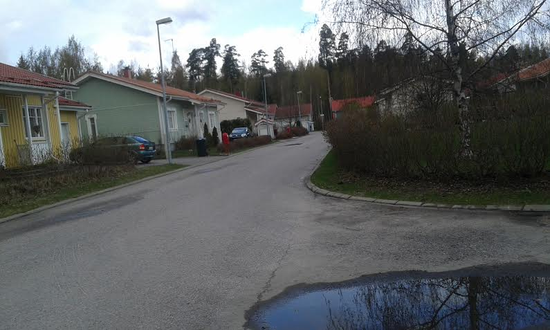 Etelä-Päiväkumpua